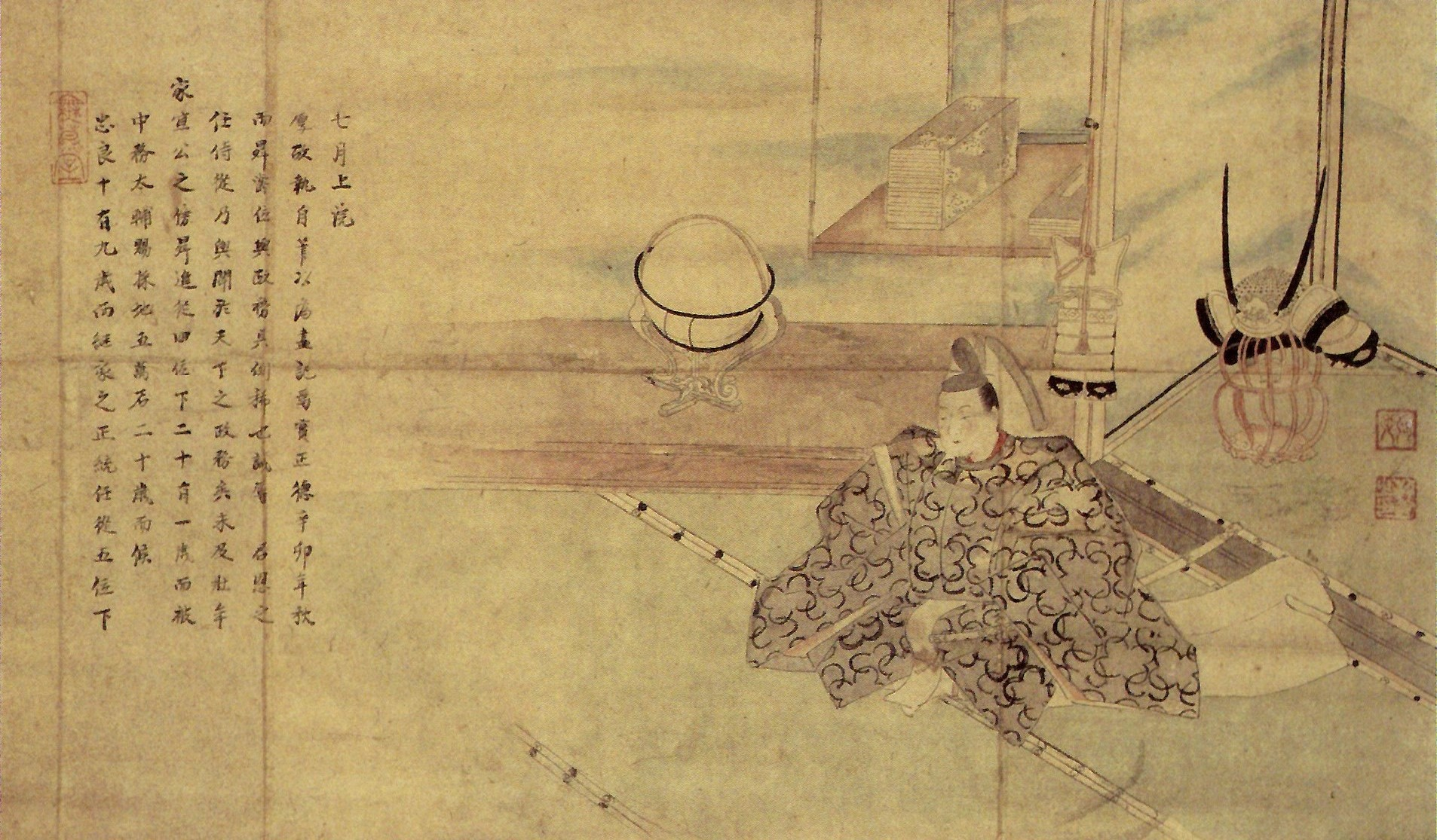 本多忠良の自画像。